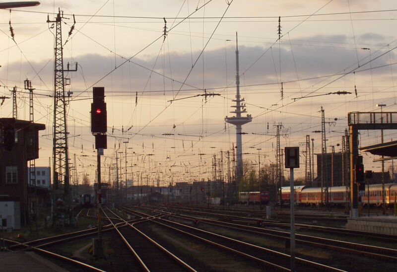 Bahnanlage am Knotenpunkt Bremen